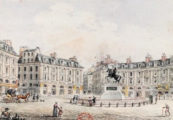 Place des Victoires, Paris, par Victor-Jean Nicolle (1754-1826). Aquarelle, 6,7 x 9,5 cm, en provenance de la collection Hippolyte Destailleur.